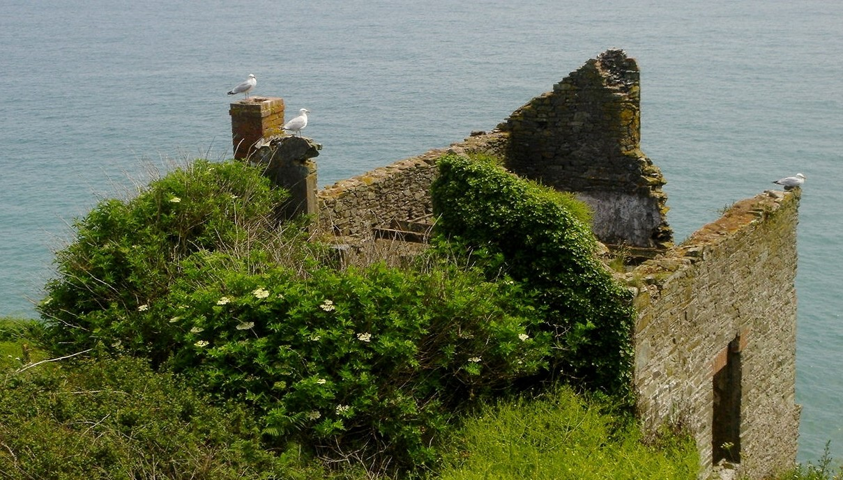 Hylätty ja autio talo Etelä-Englannin rannikolla